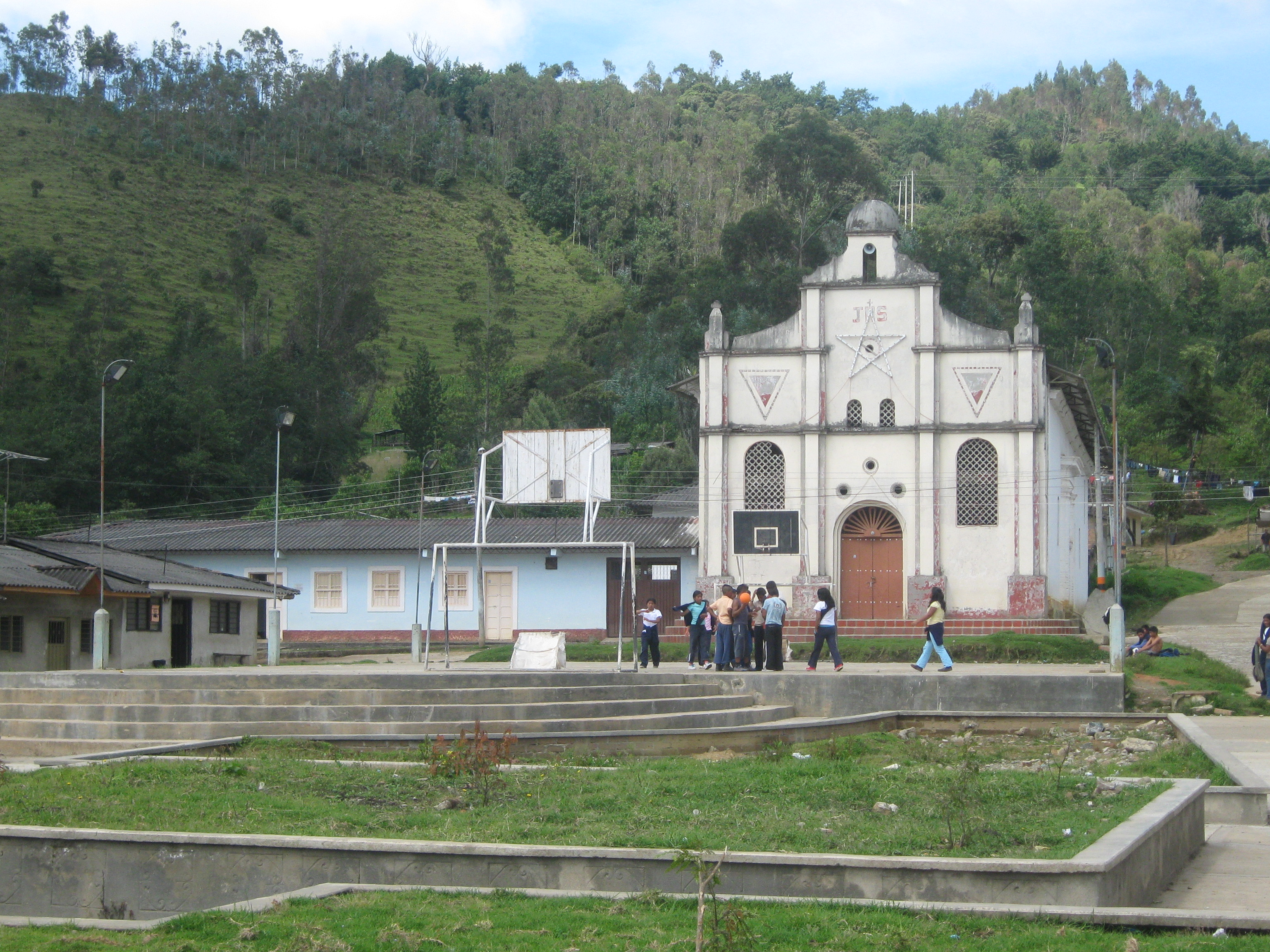 Iglesia en el parque de Pitayó